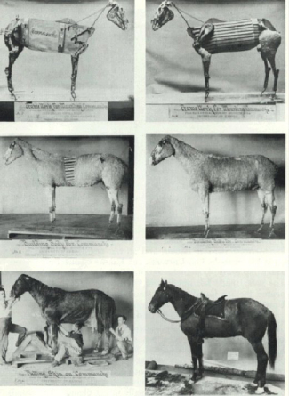 Bilderserie zur Präparation des Pferdes Comanche